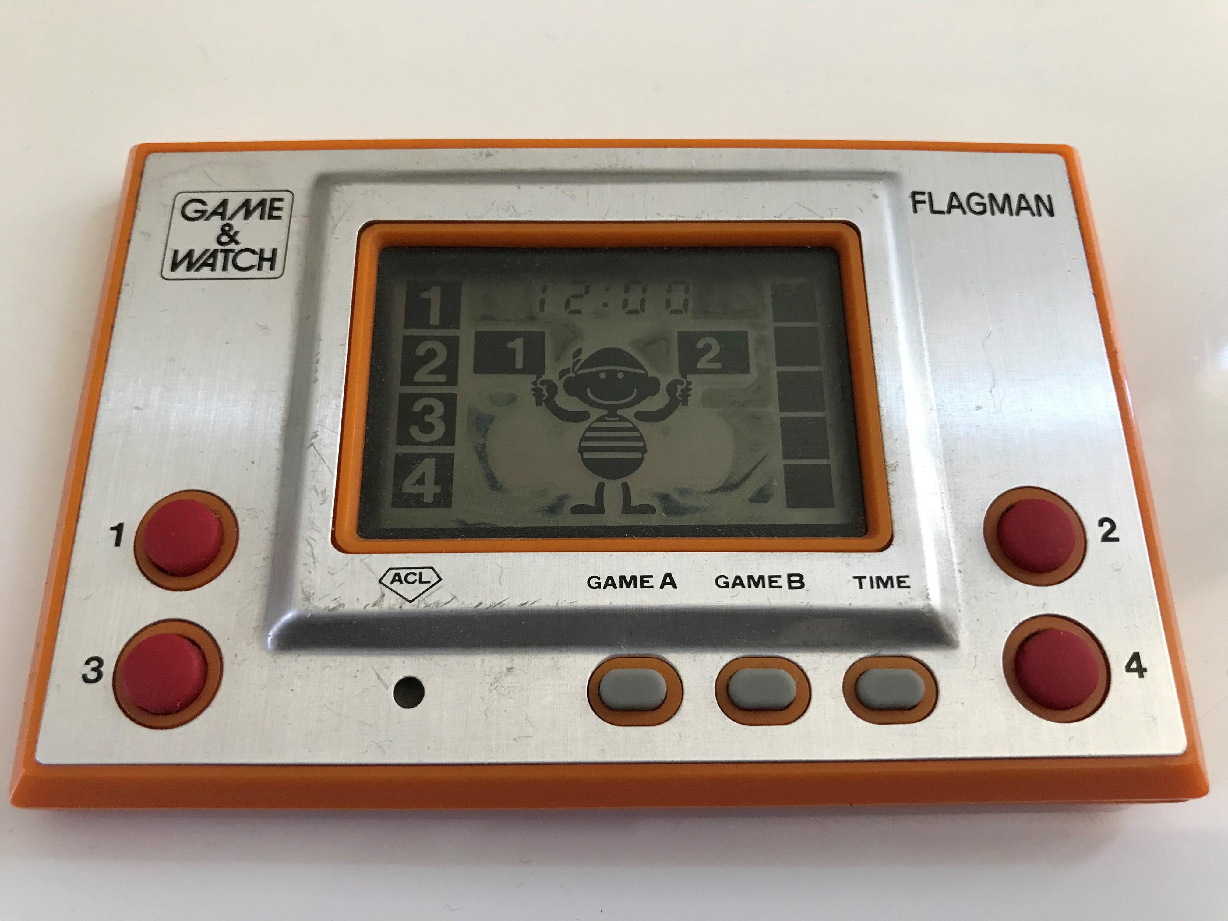 Photo du jeu électronique Nintendo Game and Watch, modèle FLAGMAN, référence FL-02